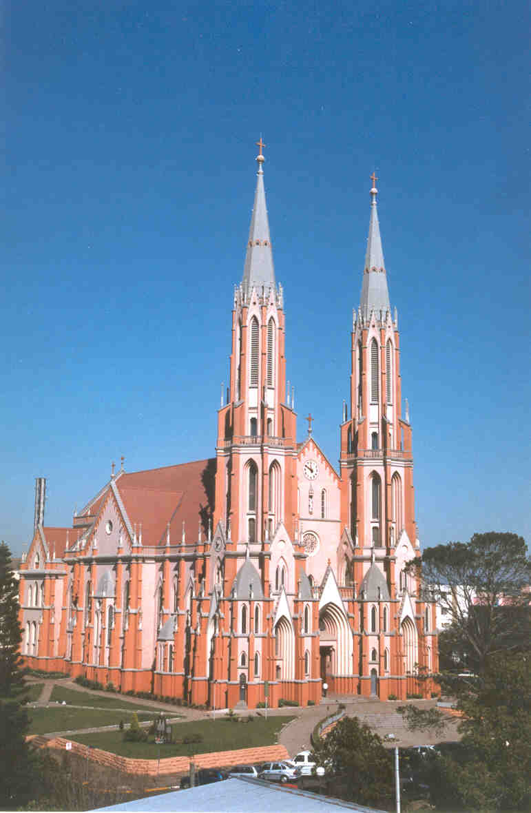 Igreja Matriz de Venâncio Aires